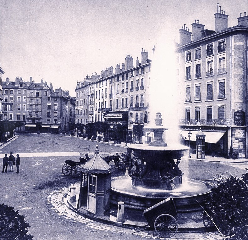 Place Grenette. Date inconnue, l'absence de rails de tramway permet d'affirmer que la photographie date d'avant 1900.